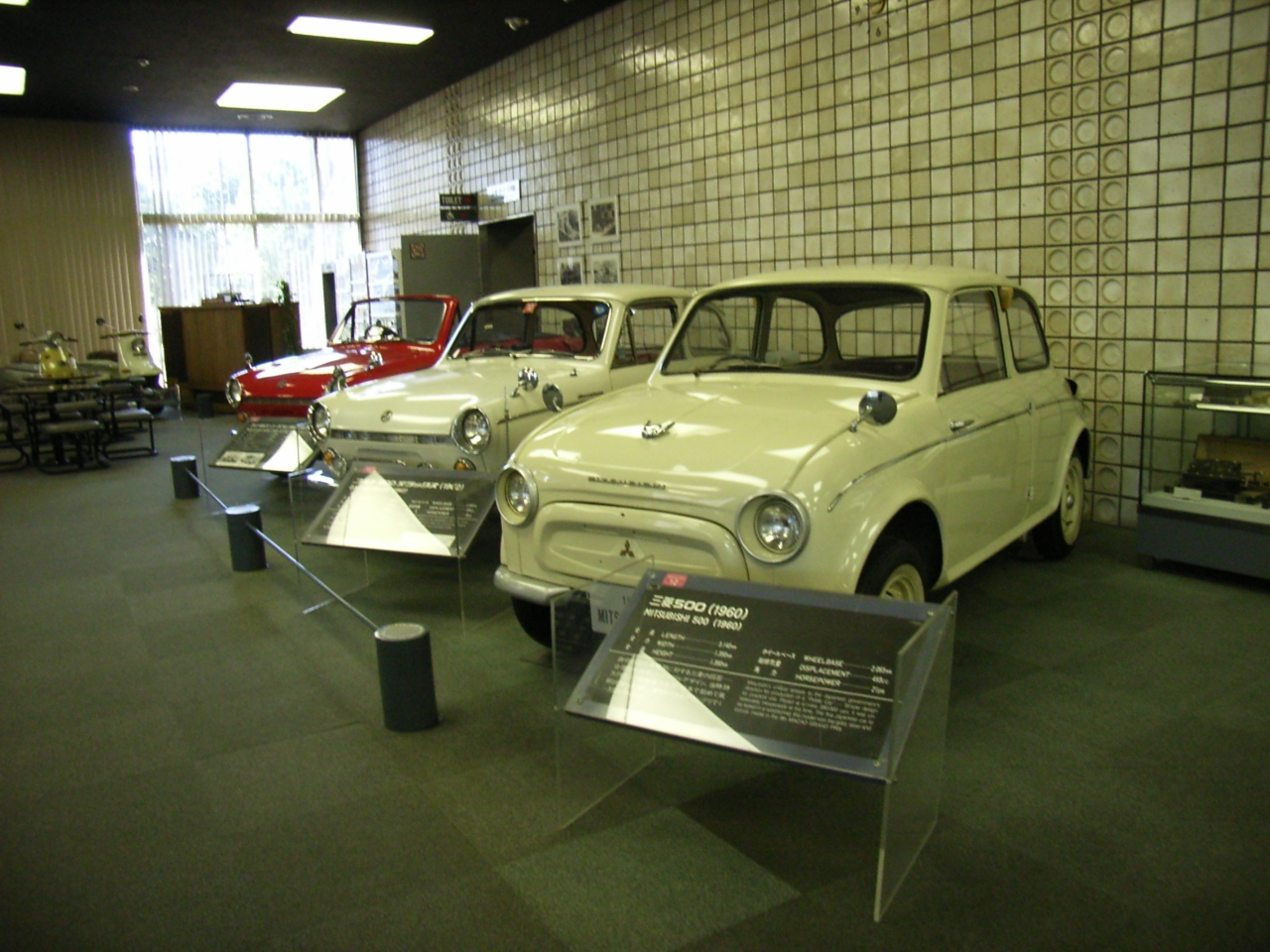 三菱500・コルト600/三菱オートギャラリー 投稿者 2006.3.21撮影 category:乗用車画像